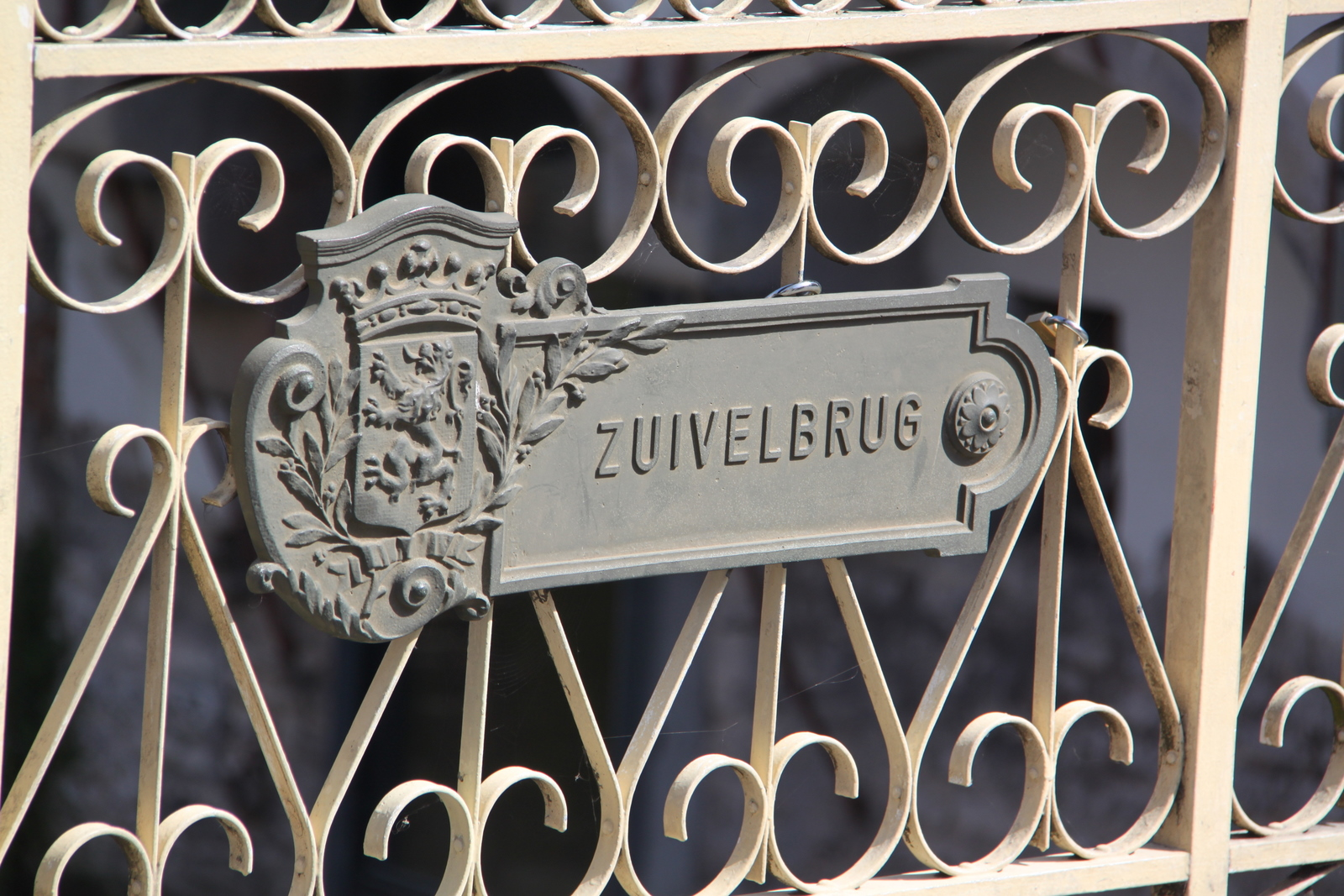 Ghent, Belgium on 2011-04-10